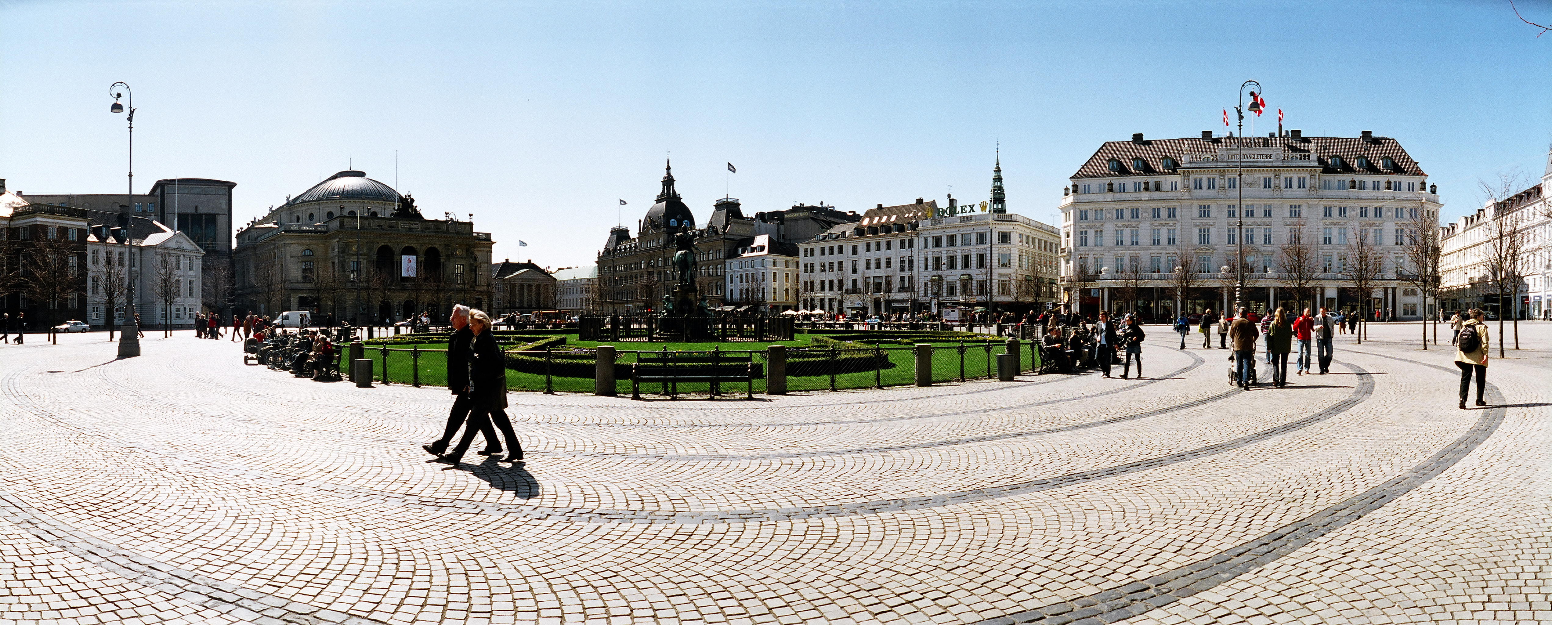 Kongens Nytorv, Copenhagen, Denmark